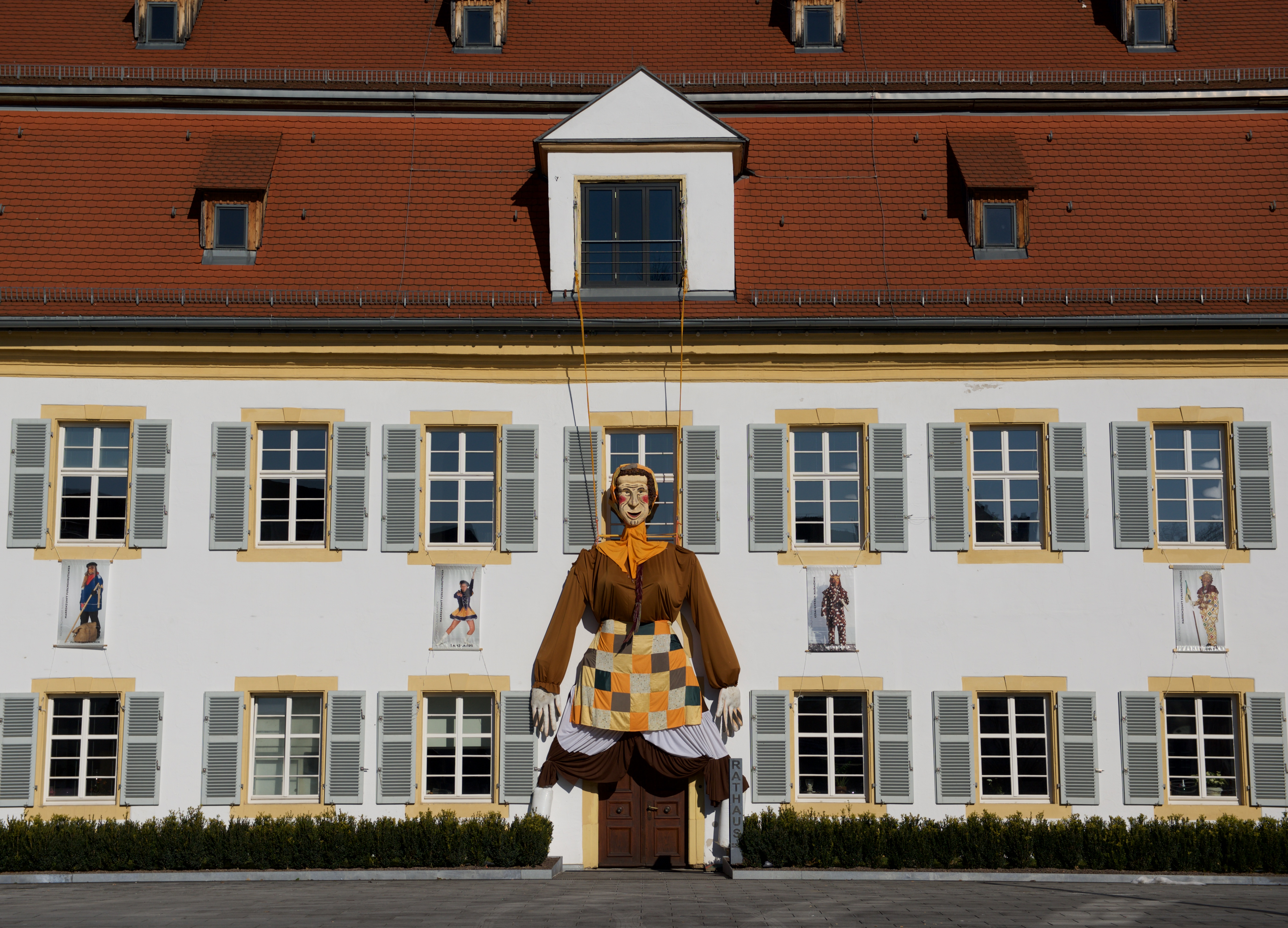 Rathaus Rechberghausen zu Fasching